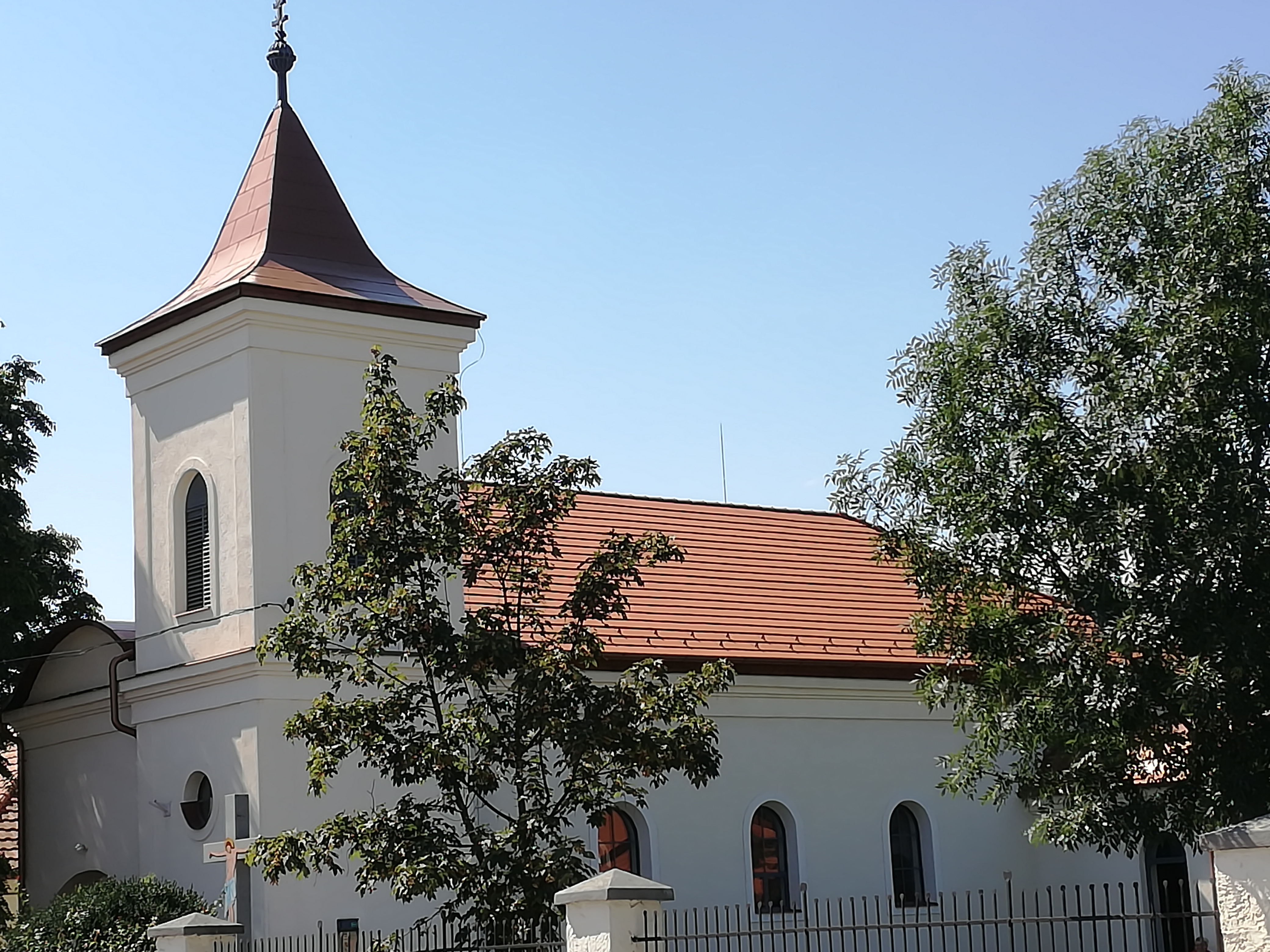 anarcsoni katolikus templom